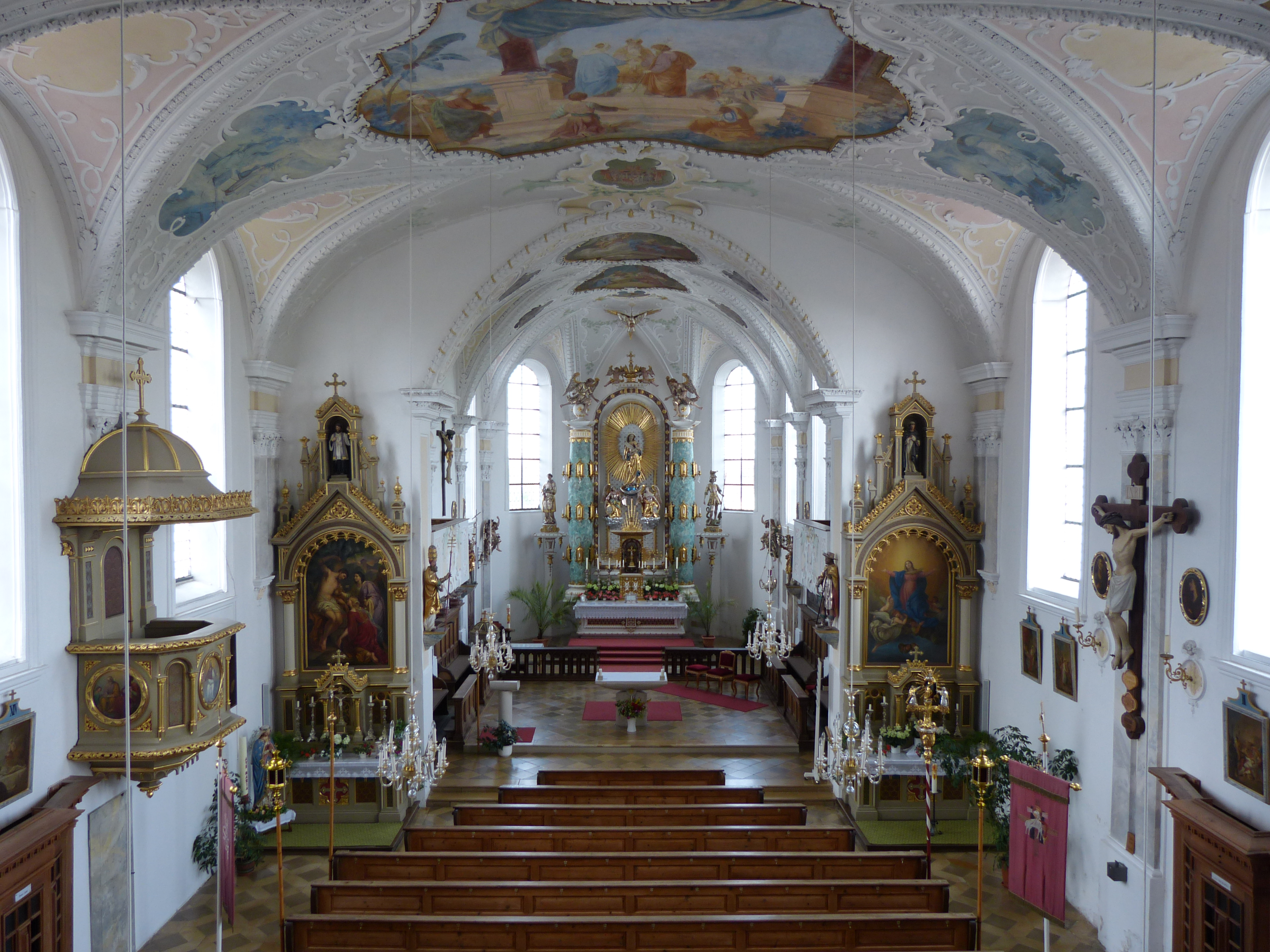 Mariä Himmelfahrt, Markt Wald, Landkreis Unterallgäu, Bayern, Deutschland